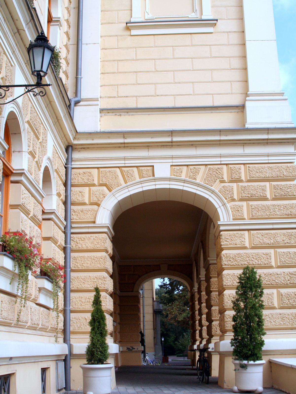 Megyeháza (Szentes, Kossuth tér 1.) This is a photo of a monument in Hungary. Identifier: 3538